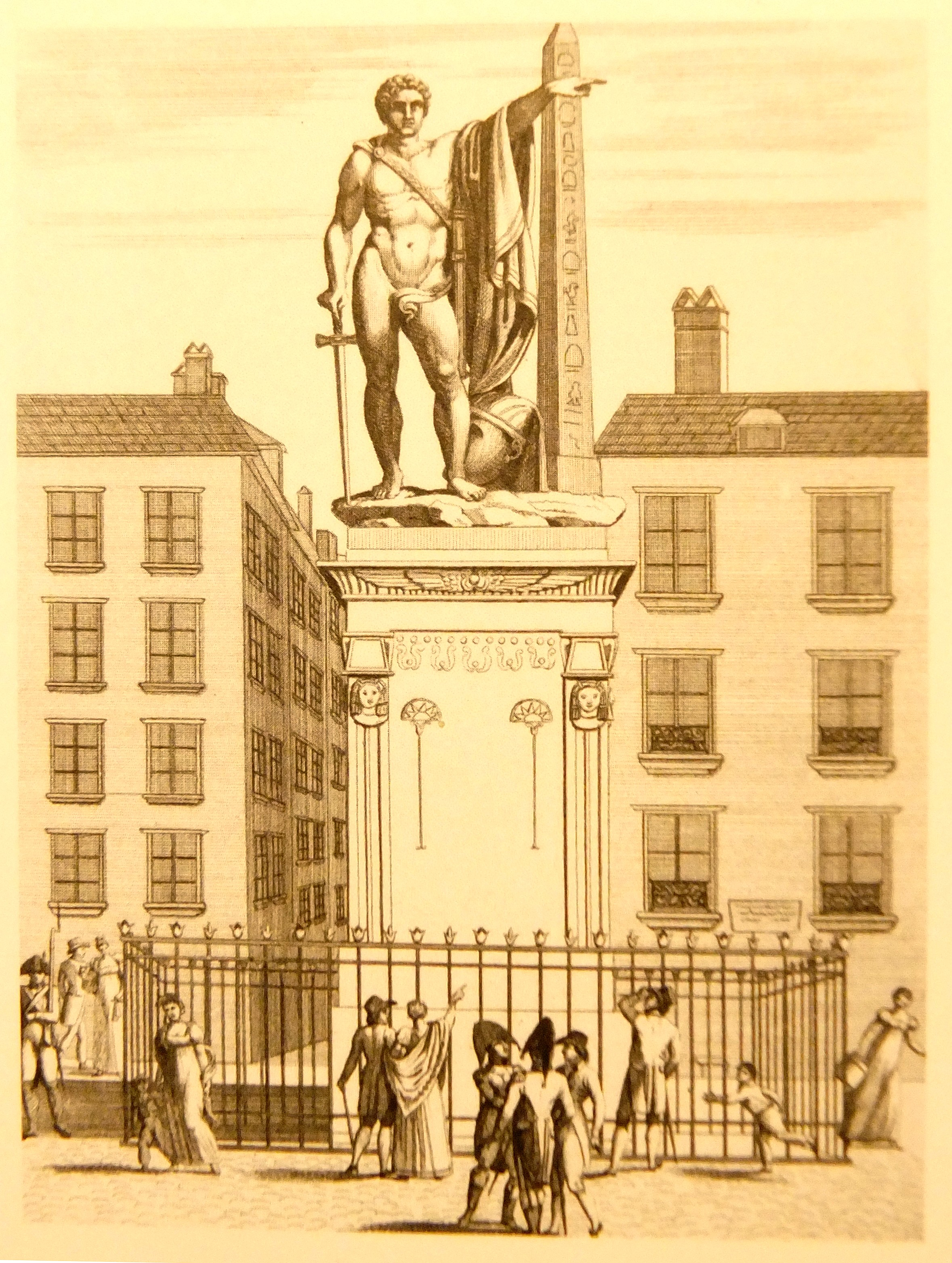 Statue du général Desaix de Claude Dejoux, érigée sur la place des Victoires à Paris en 1810. Bronze et éléments antiques égyptiens originaux. Refondue en 1814. Eau-forte anonyme conservée au Cabinet des estampes du musée Carnavalet G33302 Le socle est conçu par Lepère. Le petit obélisque de la collection Albani, rapporté de Rome, est aujourd'hui conservé au musée égyptien de Munich.